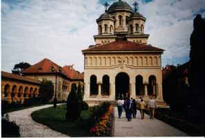 Gyulafehérvári ortodox székesegyház